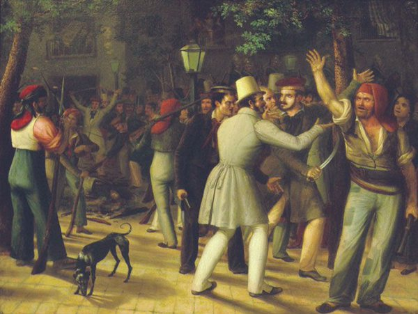 Acción del populacho barcelonés (1835), de Antoni Ferran, Museo de Historia de Barcelona.